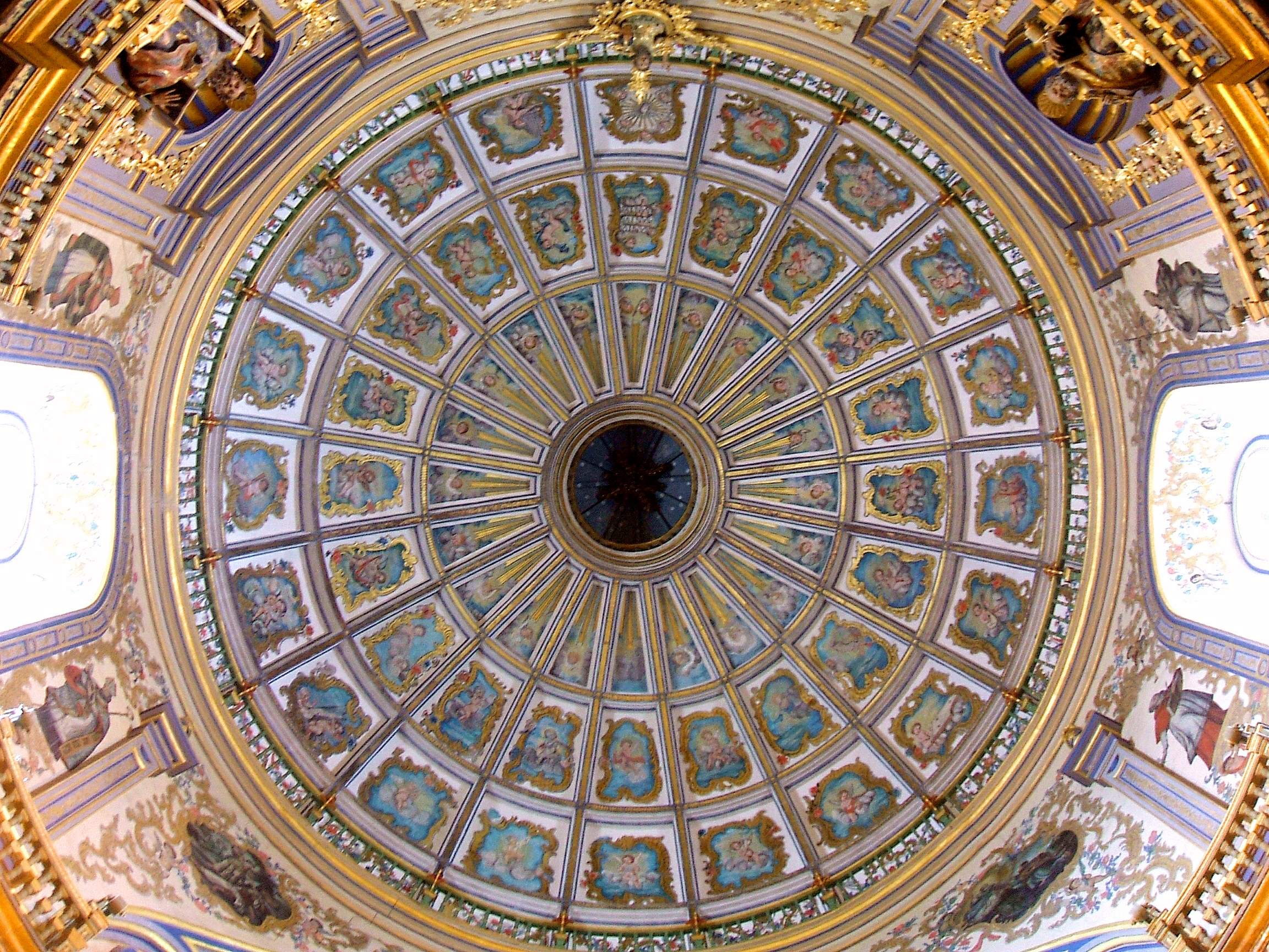 Cúpula de la cabecera de la Sacra Capilla de El Salvador, Úbeda (Jaén)